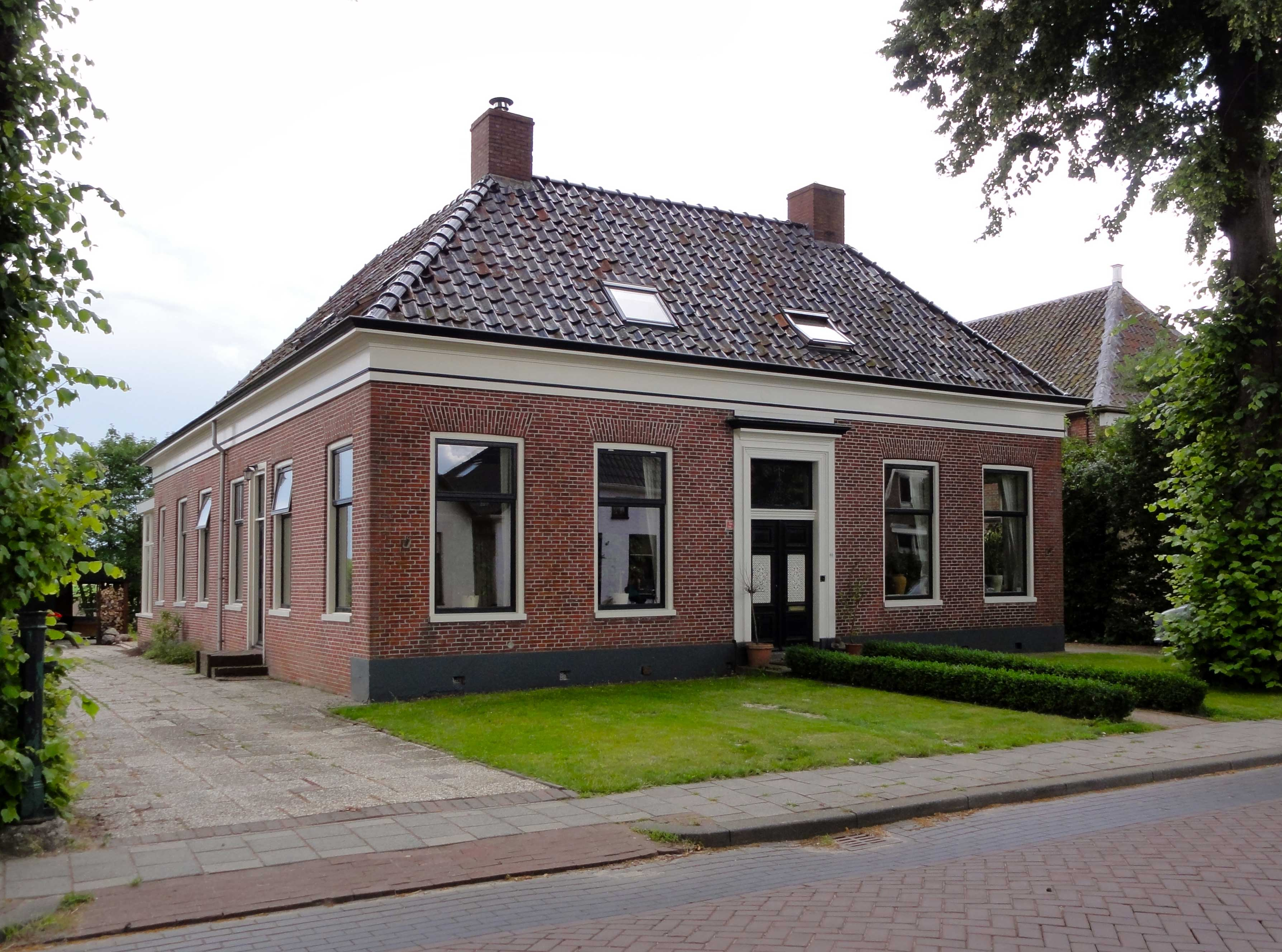 Voormalige doopsgezinde pastorie Hoofdstraat 82 Noordbroek